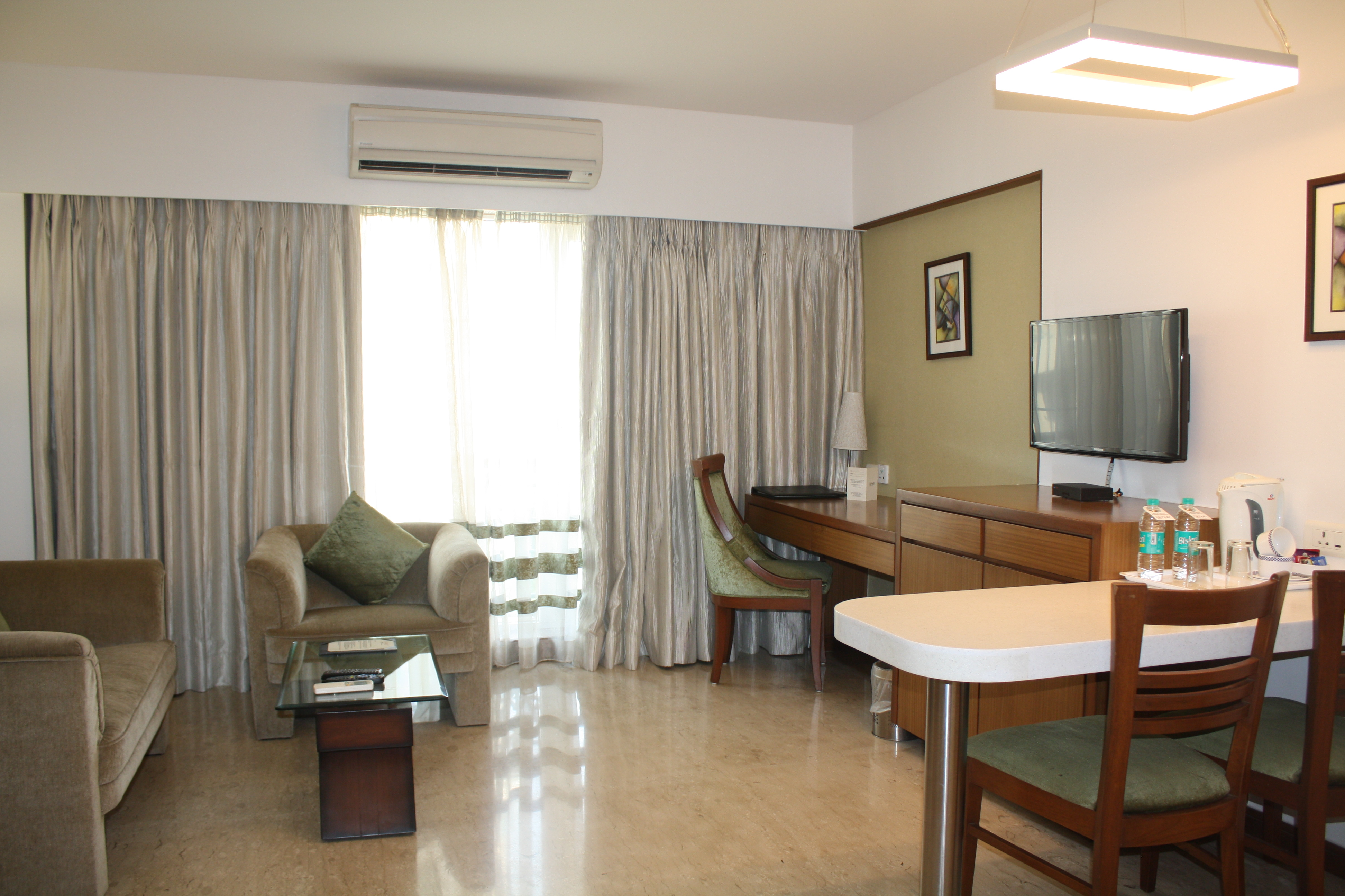 PAJASA Service Apartment mumbai location